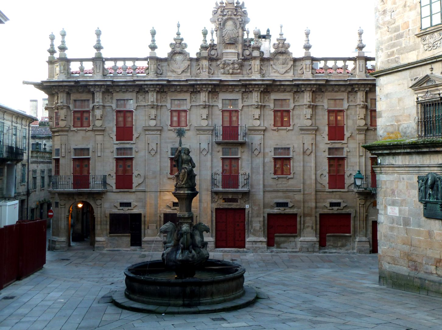 Fachada de la Casa del Cabildo después de su rehabilitación. Enero de 2012.